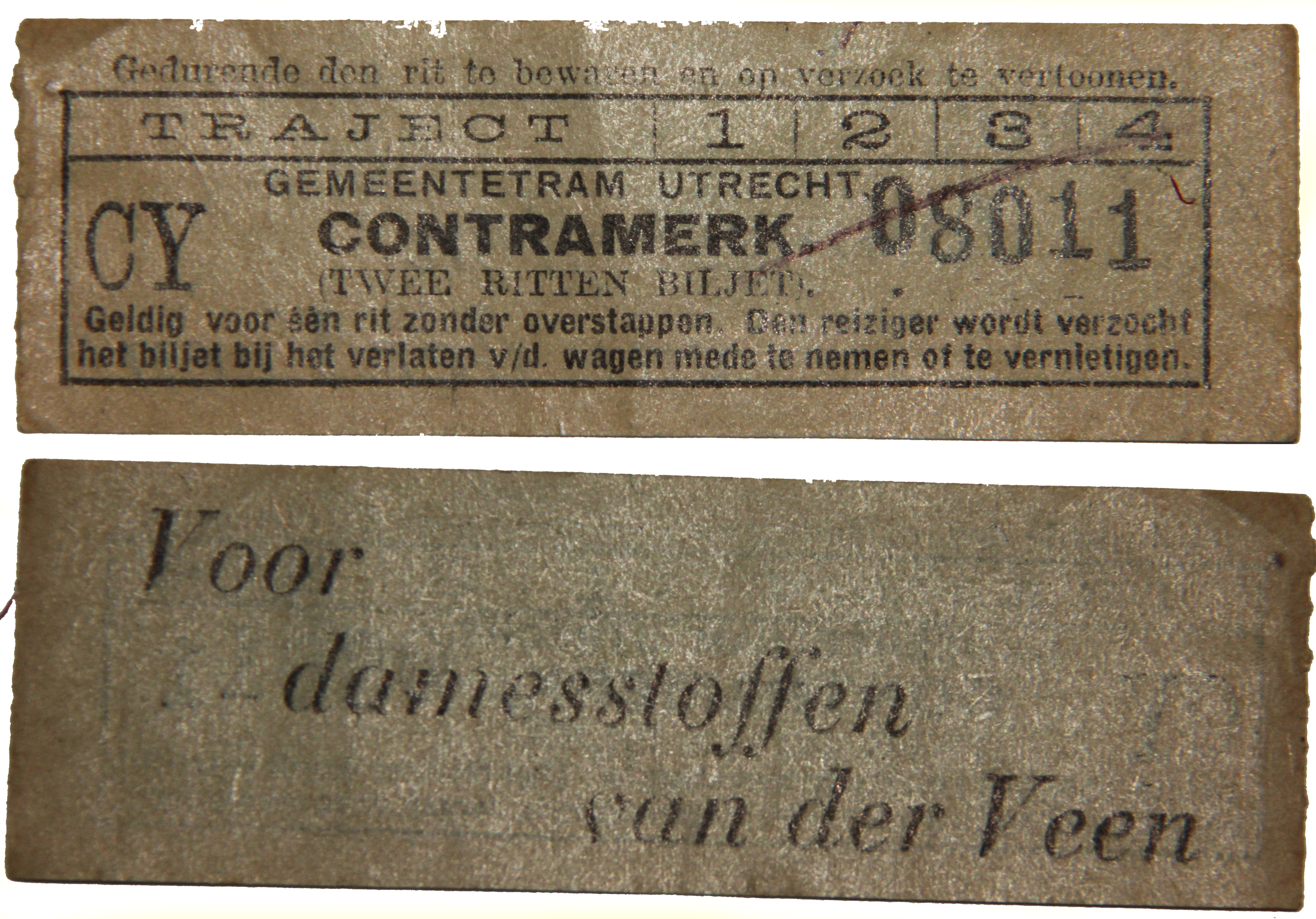 Voor- en achterzijde van een tweerittenbiljet van de Gemeentetram Utrecht. Jaar van uitgave onbekend, mogelijk april 1934. In elk geval van voor 1938 en derhalve is het gefotografeerde object, uitgegeven door een instantie, niet meer auteursrechtelijk beschermd.